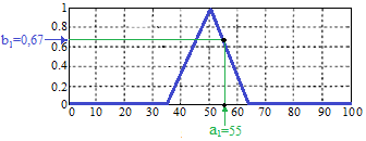 рис2